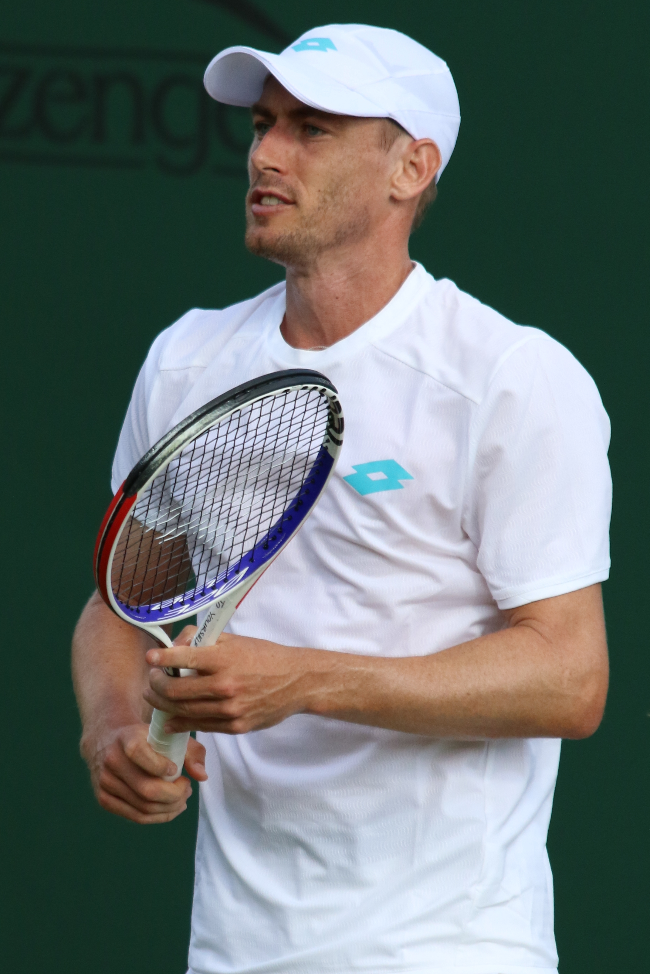 Millman WM19 (17)